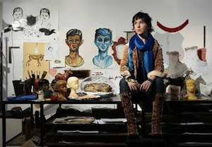 Peregrine Honig studio